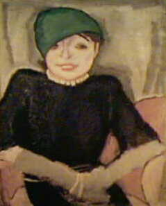 Bildnis Louise Straus-Ernst; Suermondt-Ludwig-Museum, Aachen